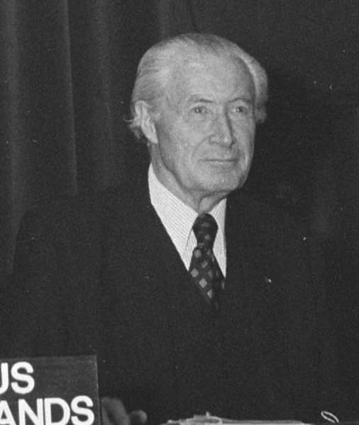 Prins Claus opent het Europees Monumentenjaar in het Congrescentrum Amsterdam; prins Claus en Lord Edward Duncan Sandys